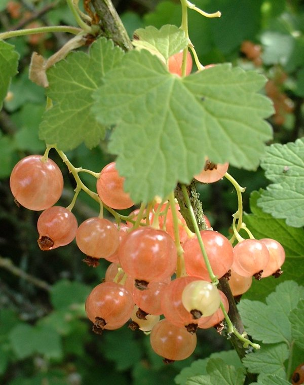 Grappe de groseilles blanches.